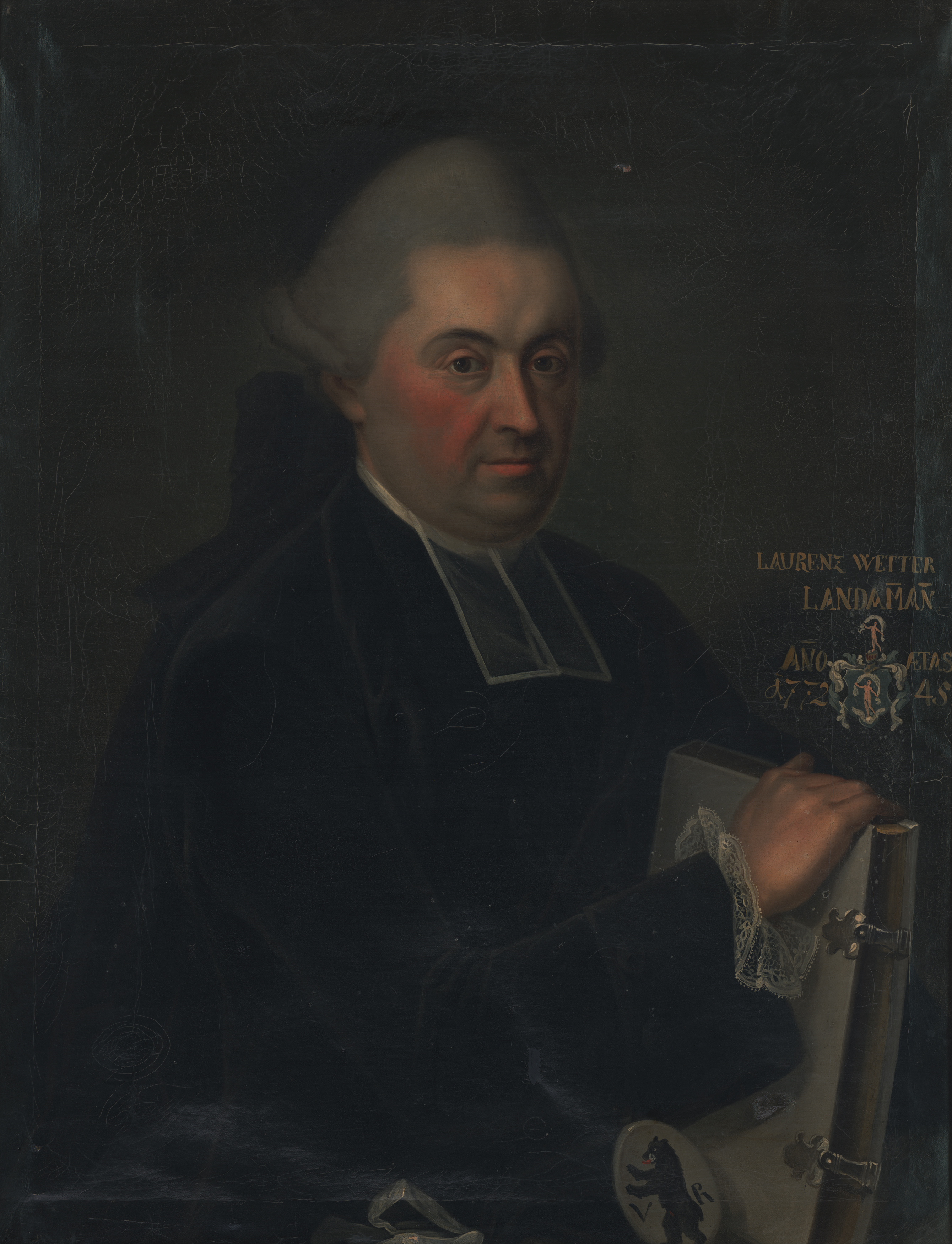 26. Landammann von Appenzell Ausserrhoden, Brustbildnis